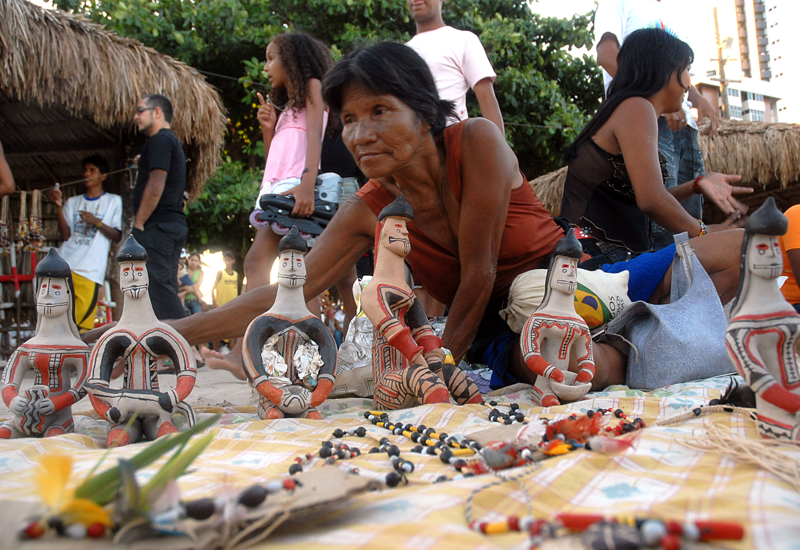 Artesanato de índios do nordeste do Brasil (Olinda).